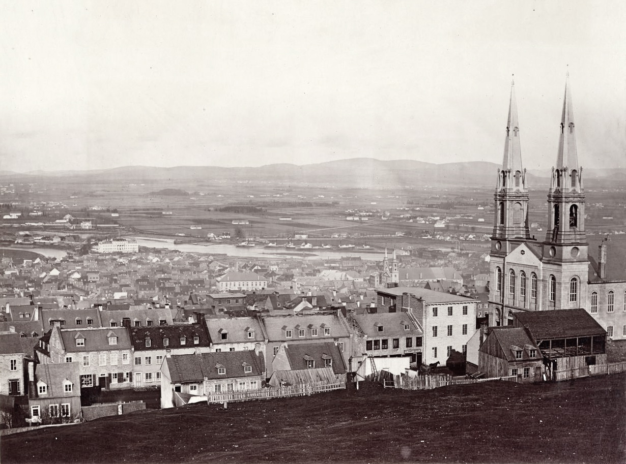 Valley of the St Charles. Au loin, une partie de la rivière Saint-Charles et de la basse-ville, à Québec (Québec). Au premier plan, des maisons d'une partie de la rue Saint-Jean et, à droite, l'ancienne église Saint-Jean-Baptiste, à deux clochers (détruite lors de l'incendie de 1881). Photographie apparemment prise depuis les environs de l'ancienne tour Martello no 3. Vraisemblablement publiée dans l'album des photographies de Samuel McLaughlin publié en 1858 par Middleton & Dawson à Québec.